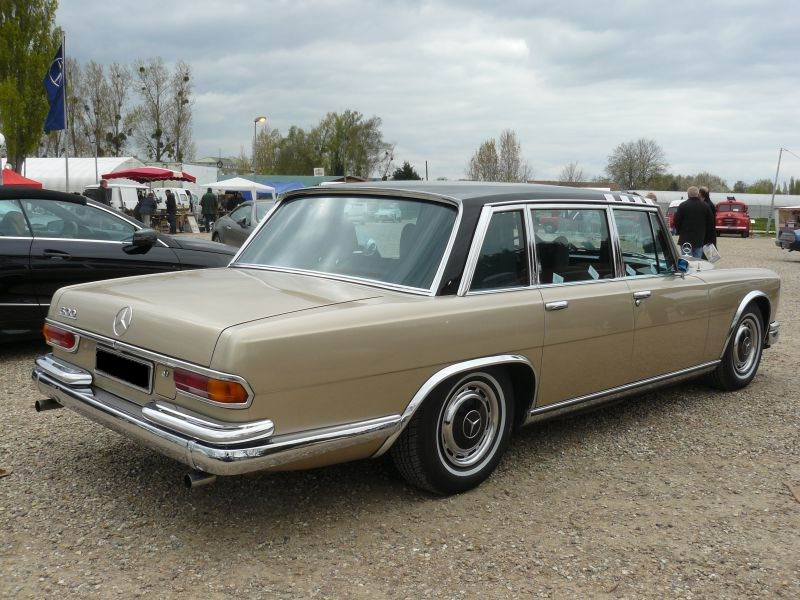 Mantes la Jolie 2012